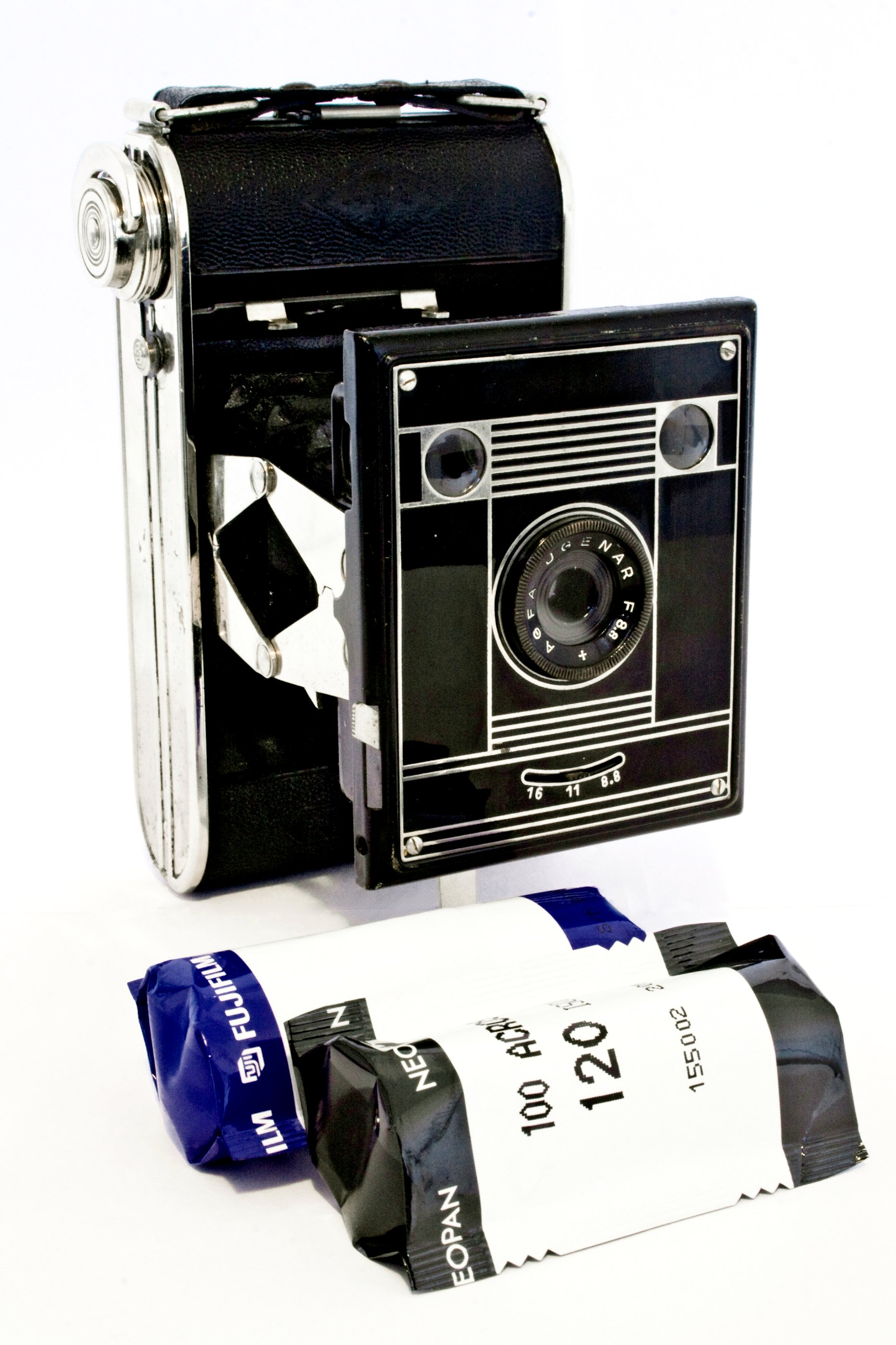 Incrivelmente bem feita. E no caso dessa, extremamente bem conservada. Não fugiu, contudo, do tradicional desmonte para limpeza geral. O nome Billy se dá a um conjunto de câmeras fabricadas pela Agfa, enquanto o Clack faz uma alusão ao barulho do obturador. Quase uma Pinhole, com aberturas f/16, f/11 e f/8,8. Pelo que me consta tempos B e 1/30 s. Possui um filtro amarelo embutido e escamoteavel para fotos P&B. Travas de segurança e dois visores frontais, para fotos na vertical e horizontal. Usa filme 120 no formato 6x4,5 com 16 fotos por rolo. O que me impressionou mesmo foi o ótimo acabamento. Das minhas câmeras de fole essa achei a mais rígida, com quatro braços articulados de cada lado. Muito compacta, até para o filme. Tudo muito justo e perfeito. Esses alemães...